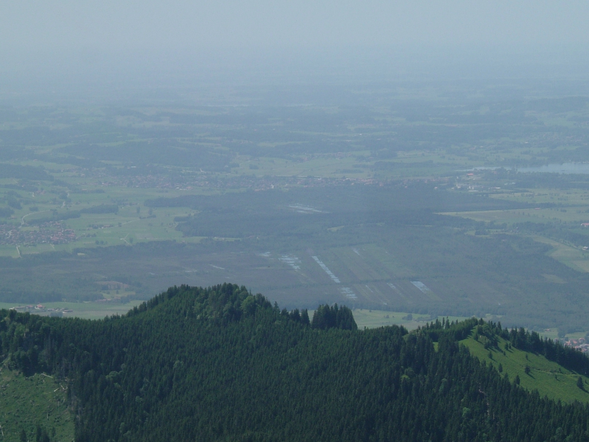 Blick vom Hochfelln auf die Kendlmühlfilzn (Chiemgau)